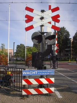 AHOB bij station Enschede